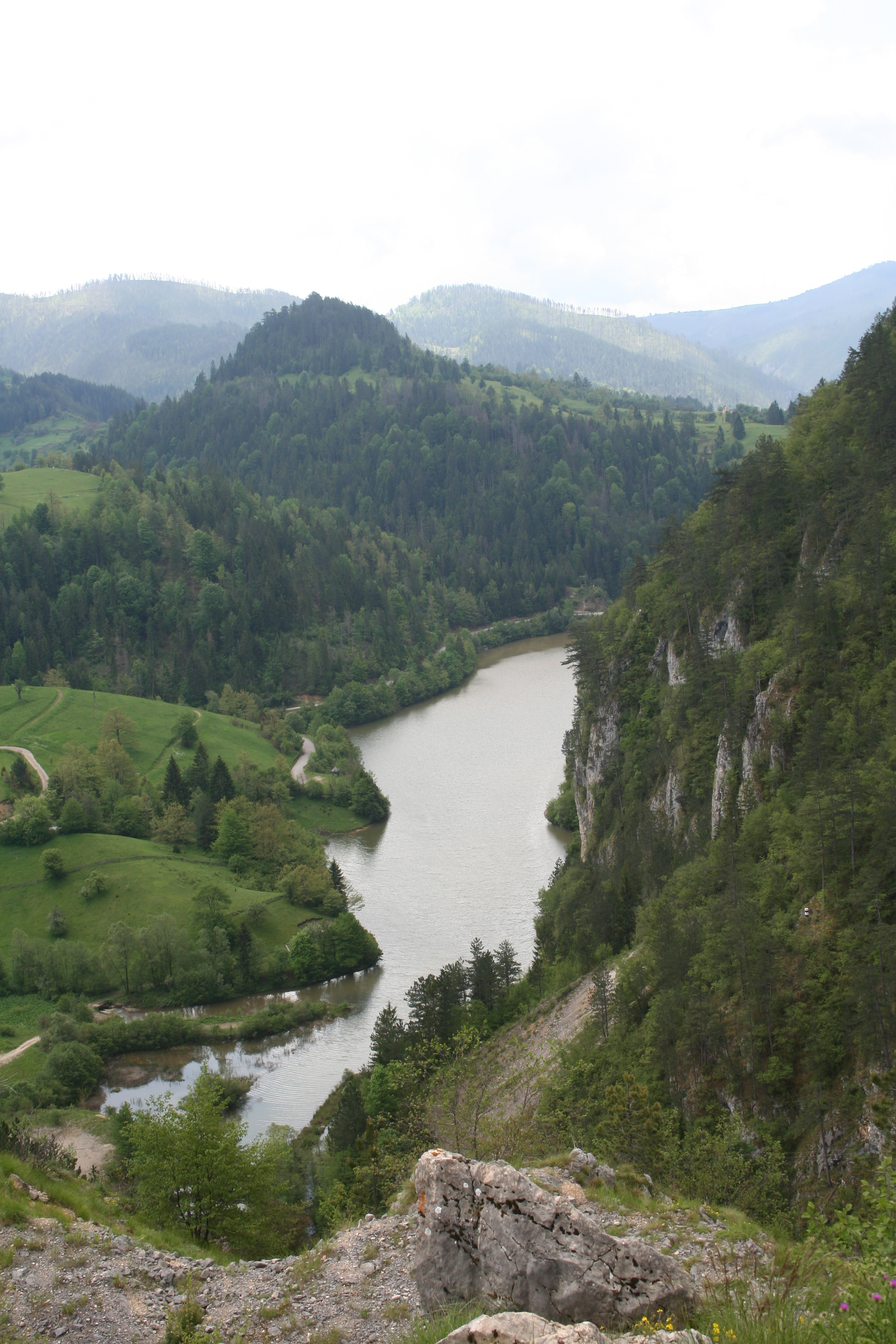 Jezero Zaovine Ово је фотографија заштићеног природног добра у Србији под шифром: НП03This is a a photo of a natural area in Serbia with ID: НП03